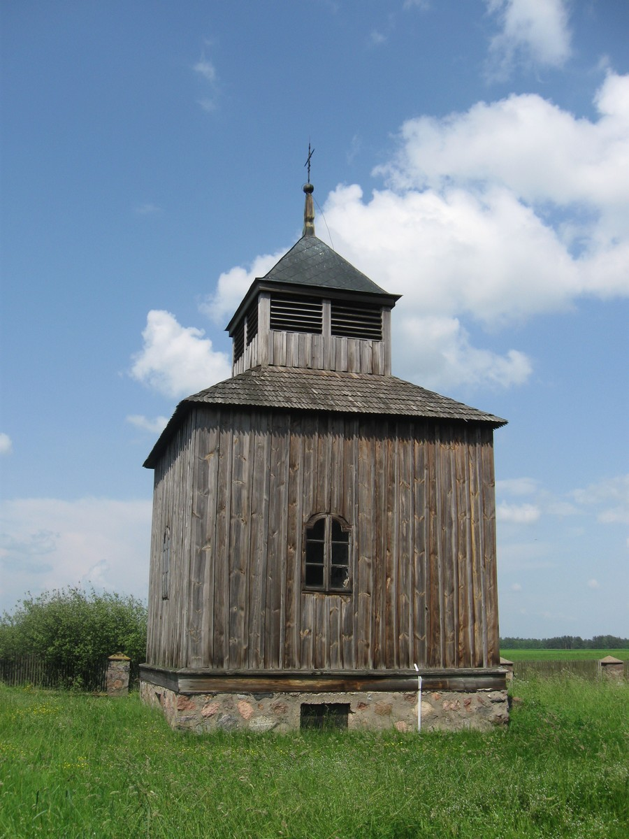 Cibory-Kołaczki - dzwonnica przy kościele filialnym p.w. Narodzenia NMP 11.1974.